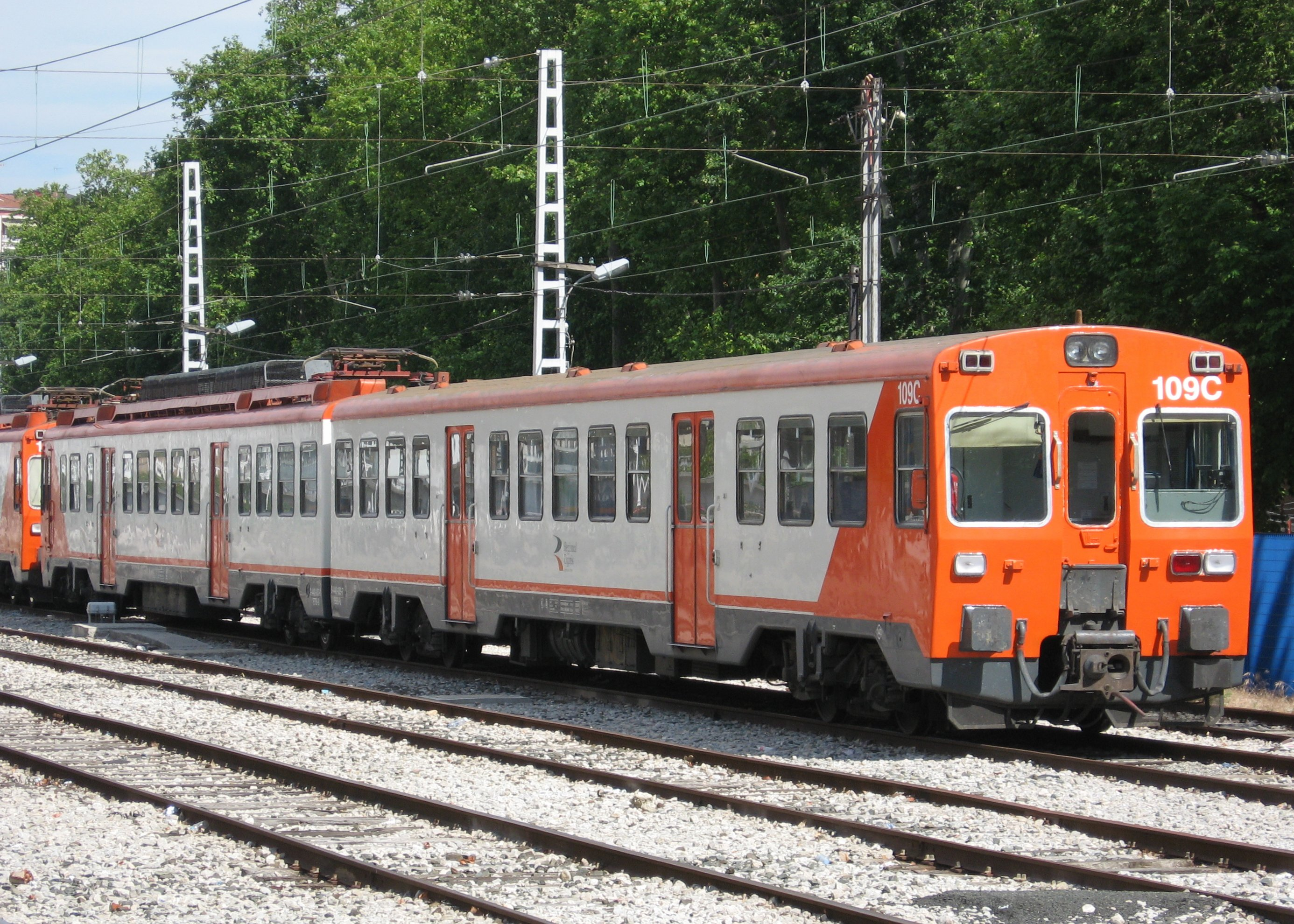 440-107 (107M-109C) en la estación del ferrocarril de Vitoria-Gasteiz.